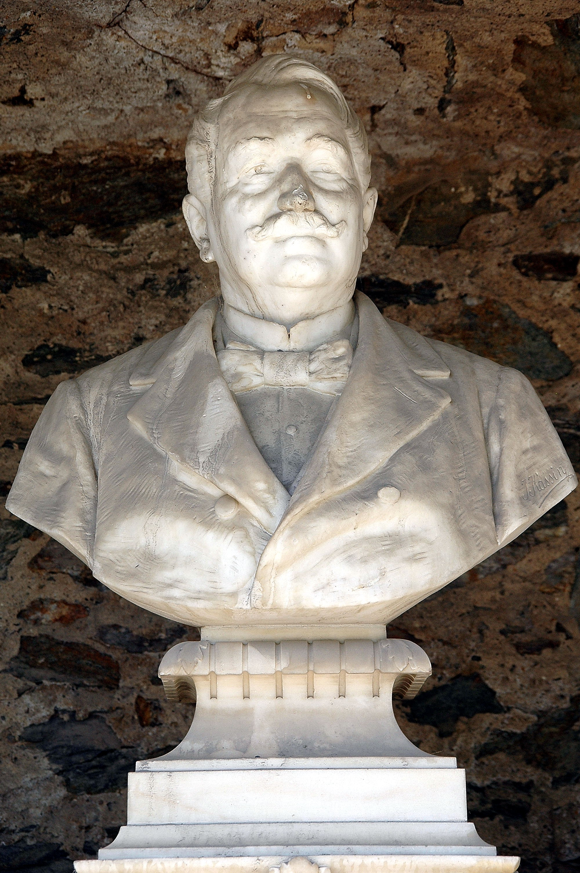 Bust of Kink at Schweizerhaus, Kreuzbergl, Klagenfurt, Carinthia, Austria, EU